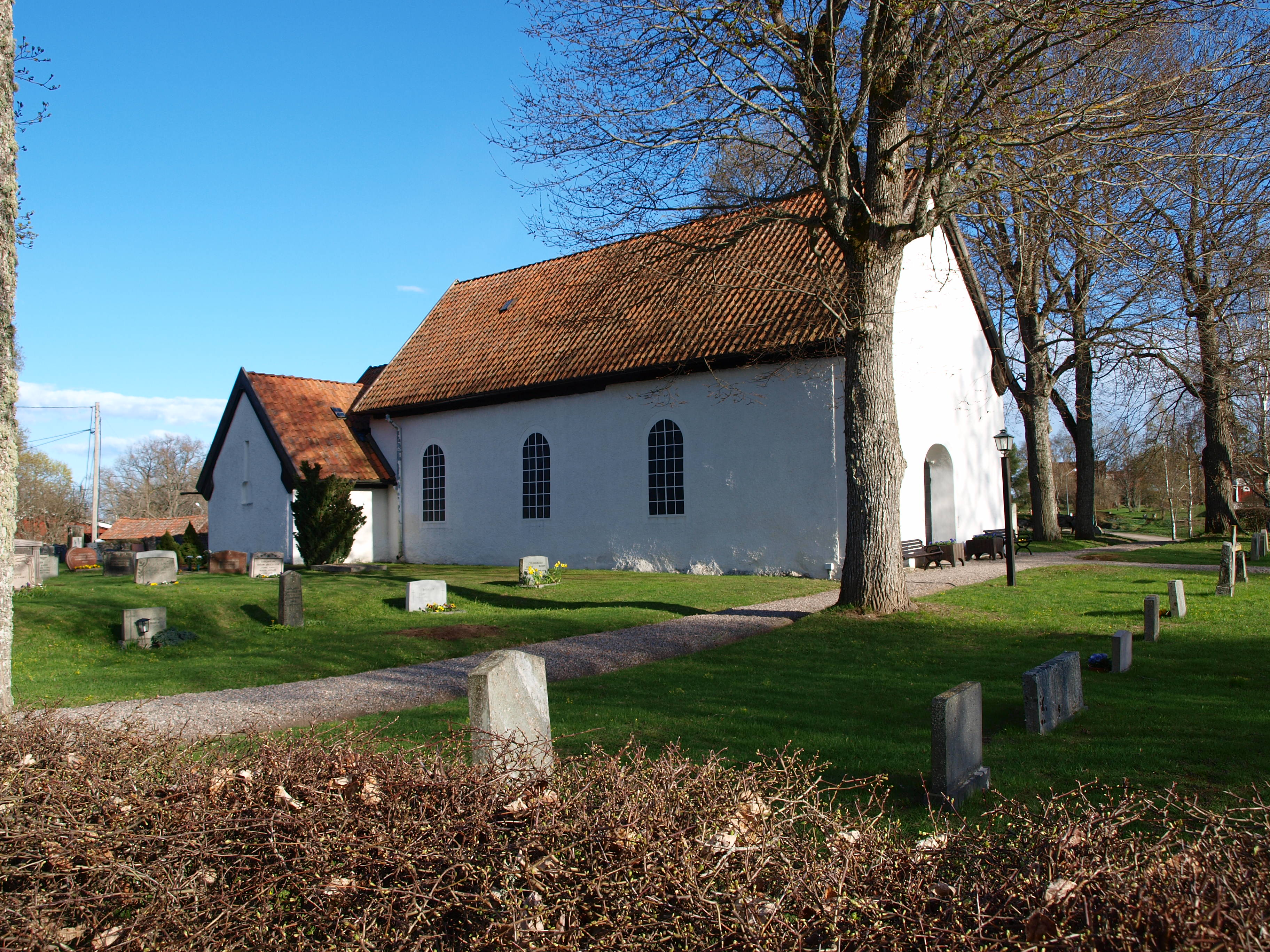 Lids kyrka i Södermanland.